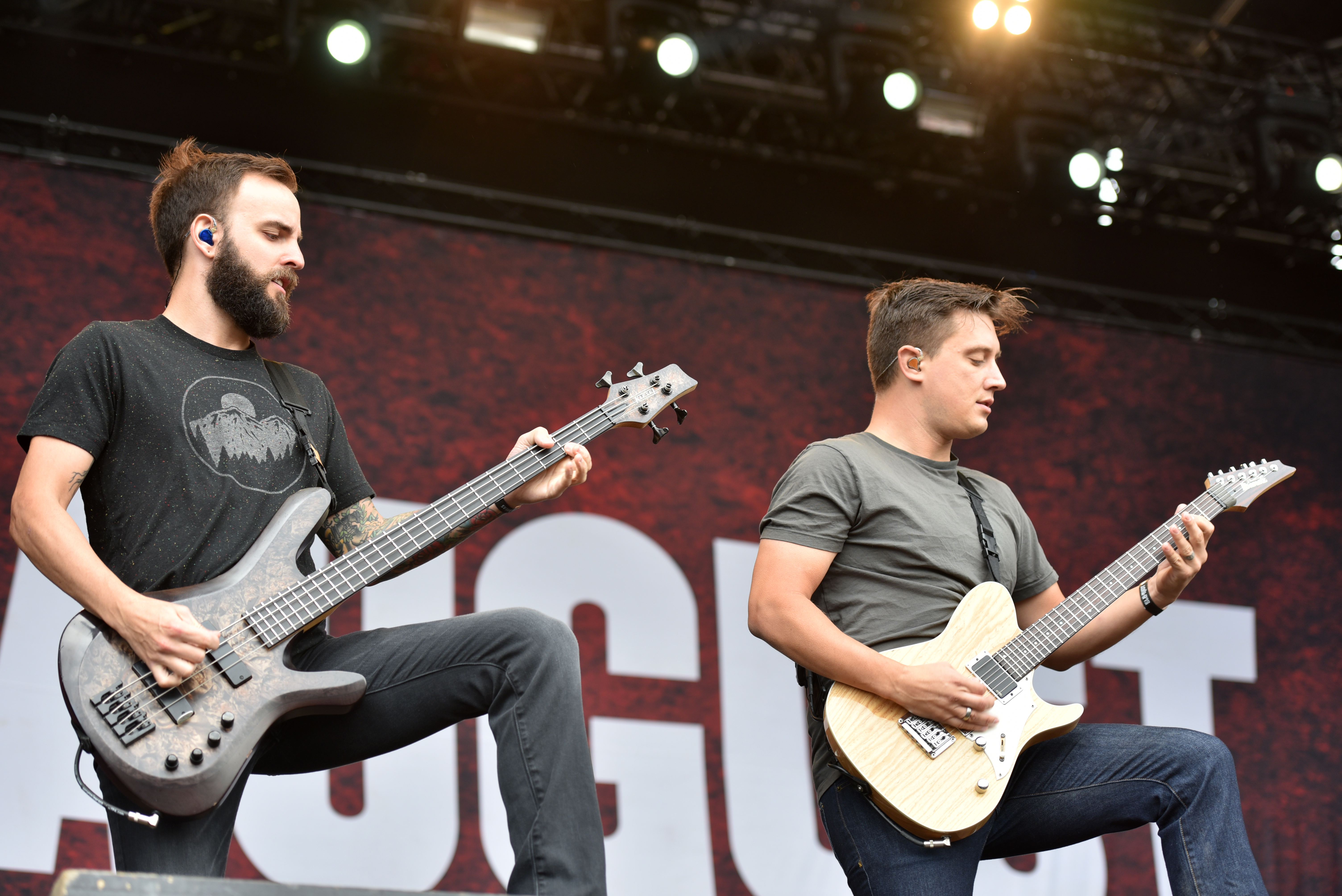 August Burns Red beim Elbriot 2017